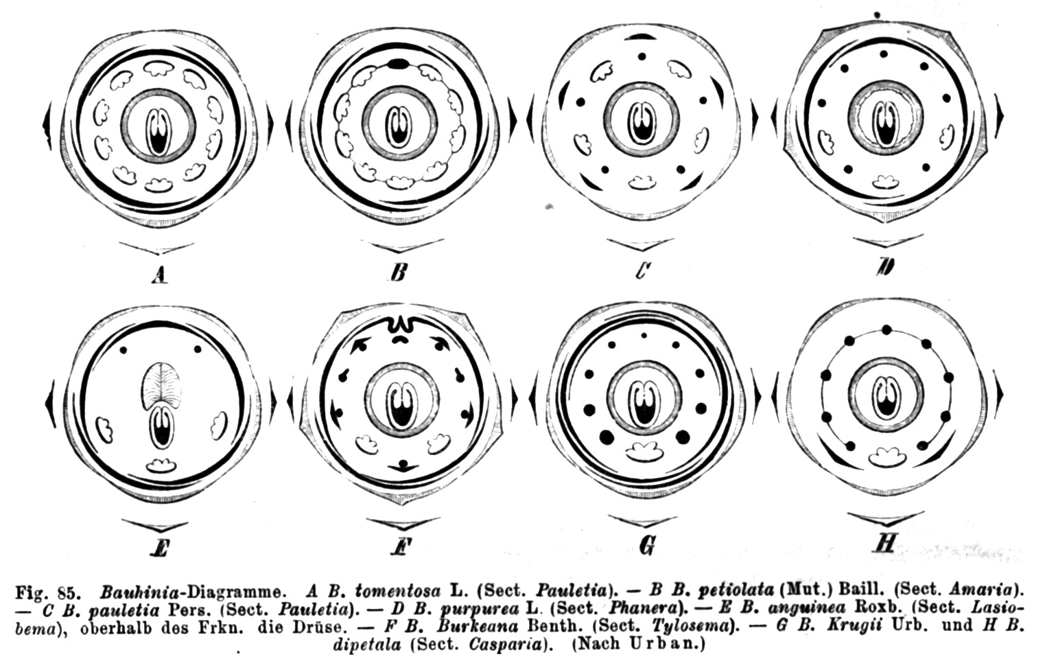 Illustration from book A. Bauhinia tomentosa B. Bauhinia petiolata? C. Bauhinia pauletia? D. Bauhinia purpurea E. Bauhinia anguinea? F. Bauhinia burkeana! G. Bauhinia krugii = Bauhinia monandra H. Bauhinia dipetala